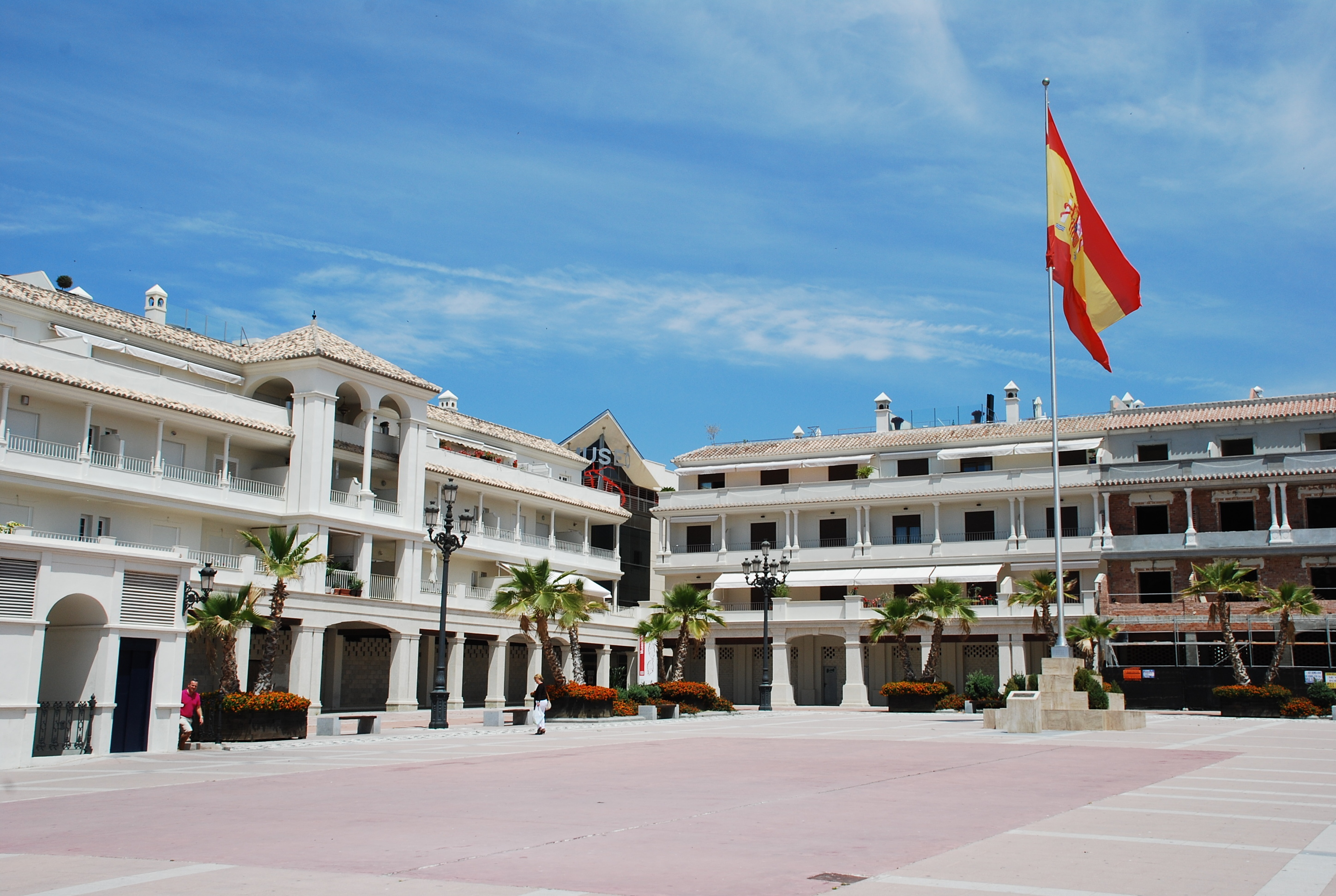 Plaza de España en Nerja (Málaga, España)